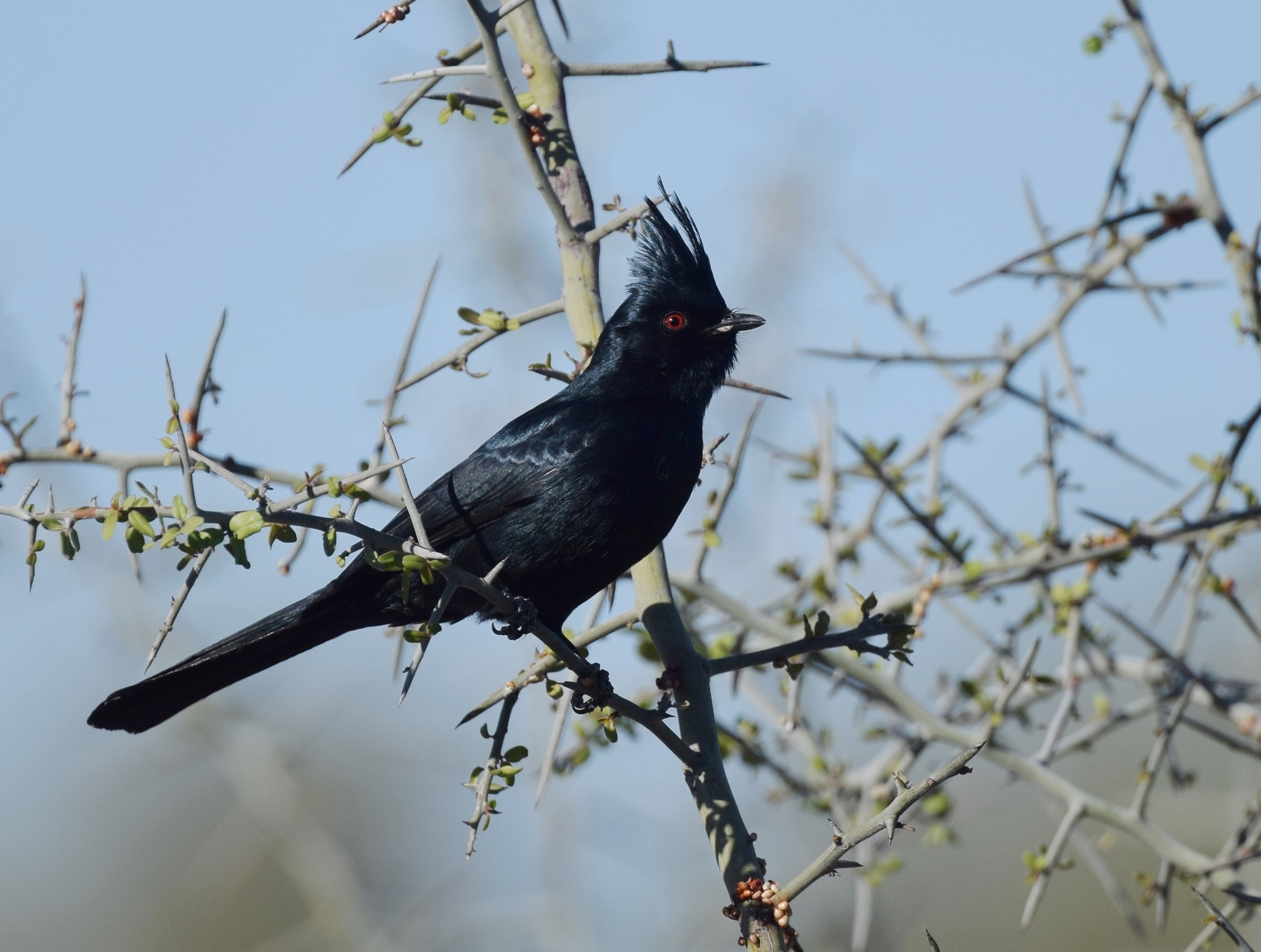 AZ 2017